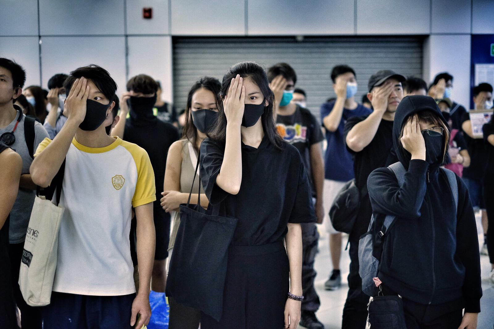 中文（香港）: 821元朗靜坐